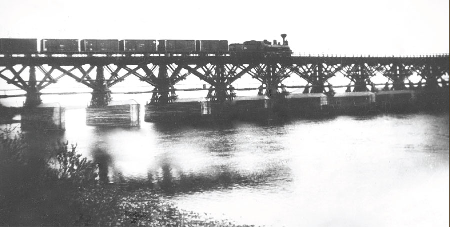 г. Иркутск. Железнодорожный поезд проходит по мосту, сооруженному на деревянных сваях.